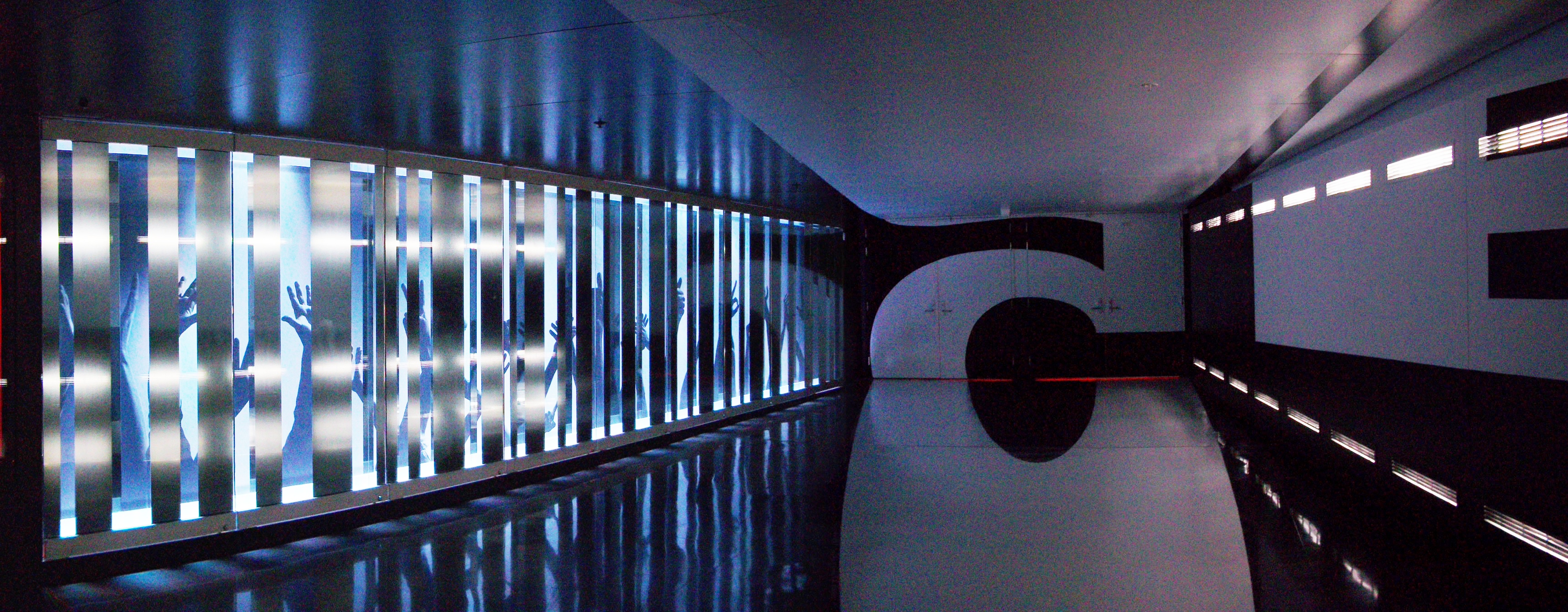 Entrée de la Cinquième salle de la Place des Arts, Montréal